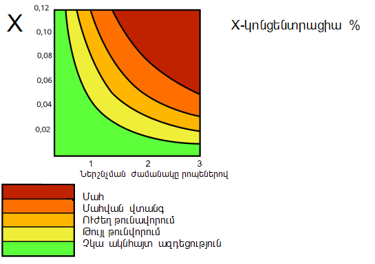 Ածխածնի մոնոքսիդի թունավորման աստիճանները